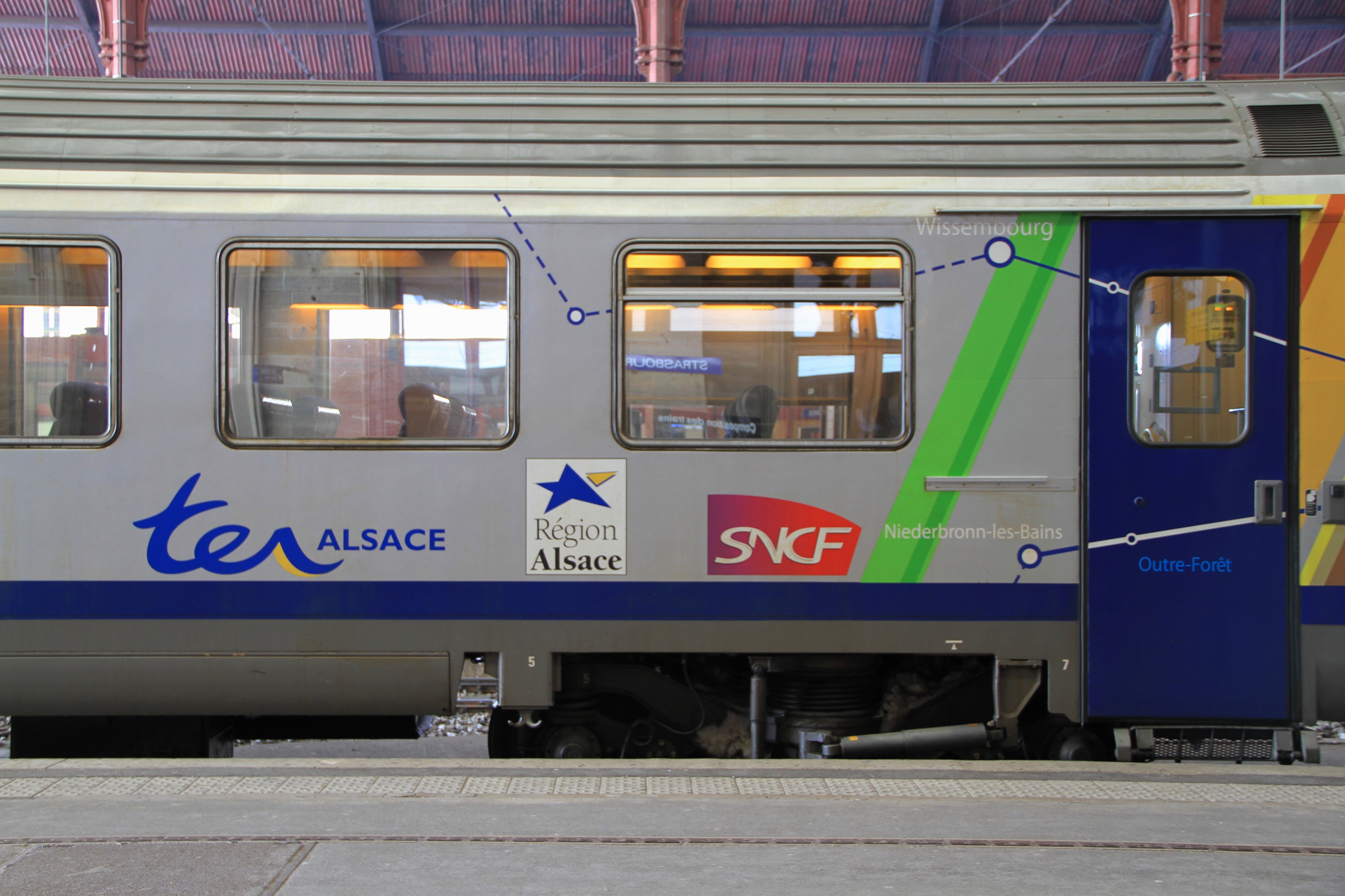 TER 200 Alsace marquage janvier 2013 en gare de Strasbourg Ville